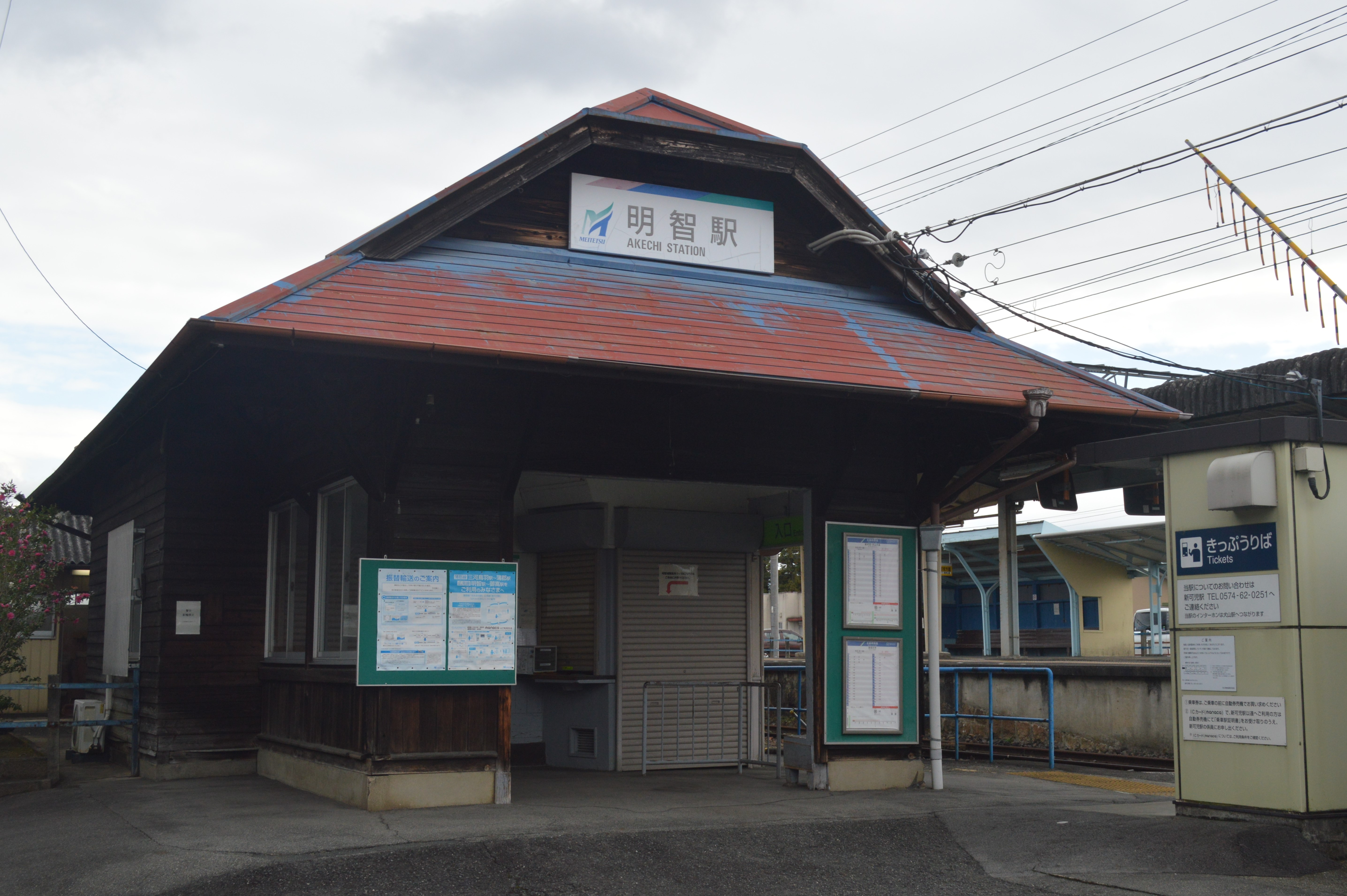 名鉄広見線明智駅。岐阜県可児市。